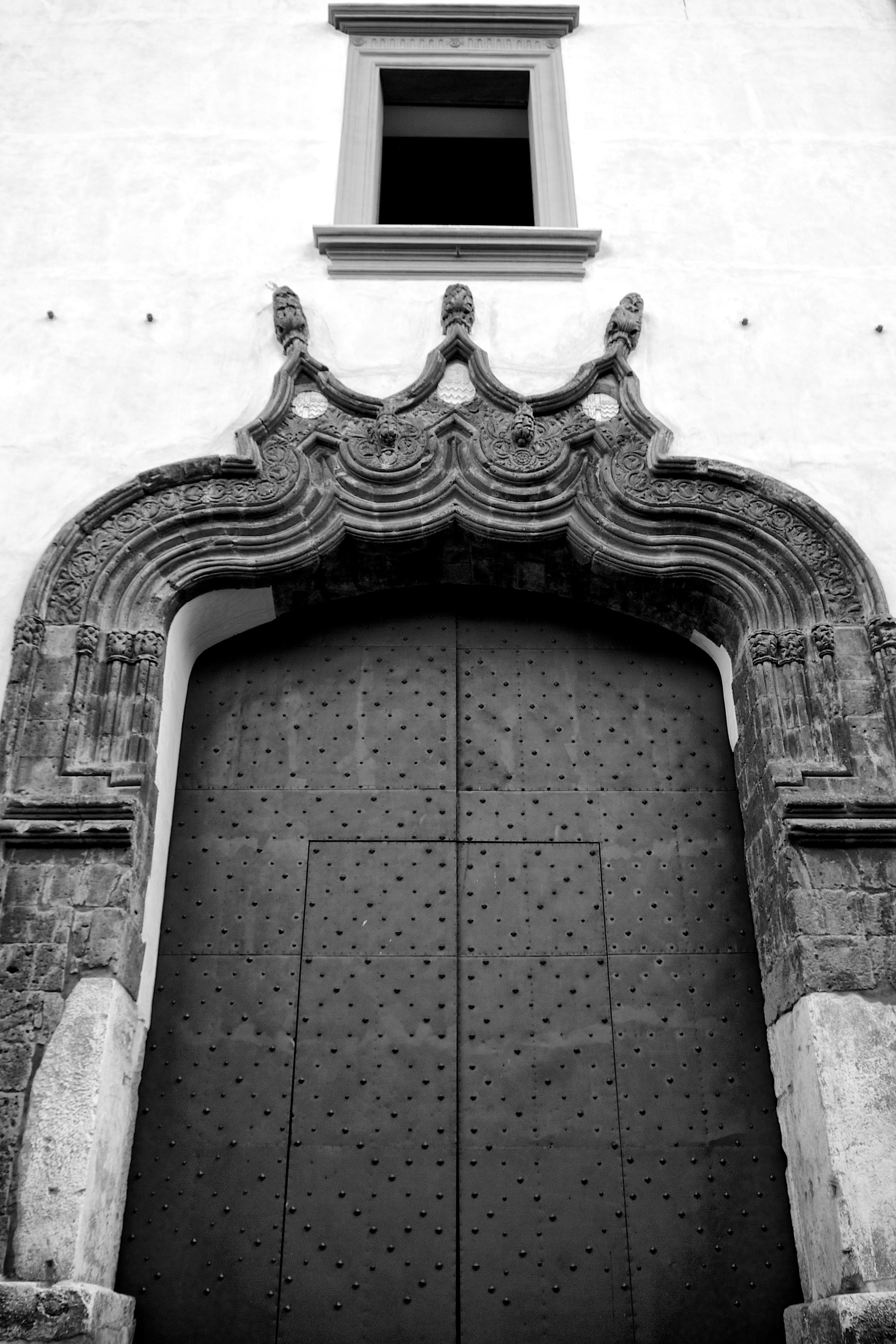 Museo provinciale Campano - Ingresso Principale - Palazzo Antignano This is a photo of a monument which is part of cultural heritage of Italy.